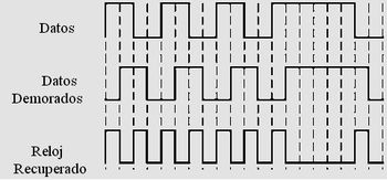 figura0006